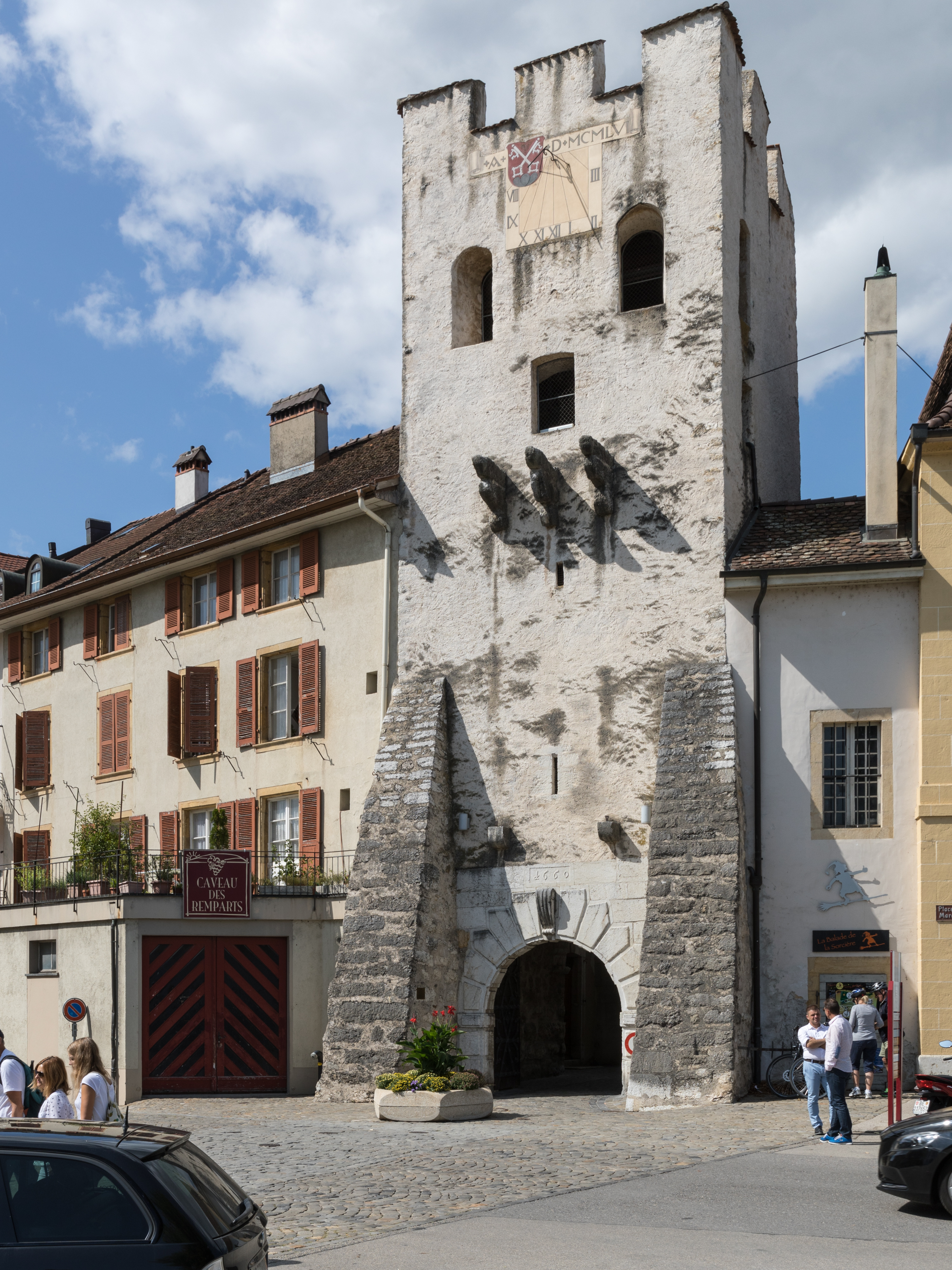 Stadttor "Tour de Rive" in La Neuveville BE